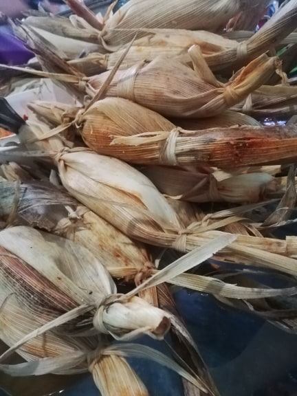 Chanchamitos